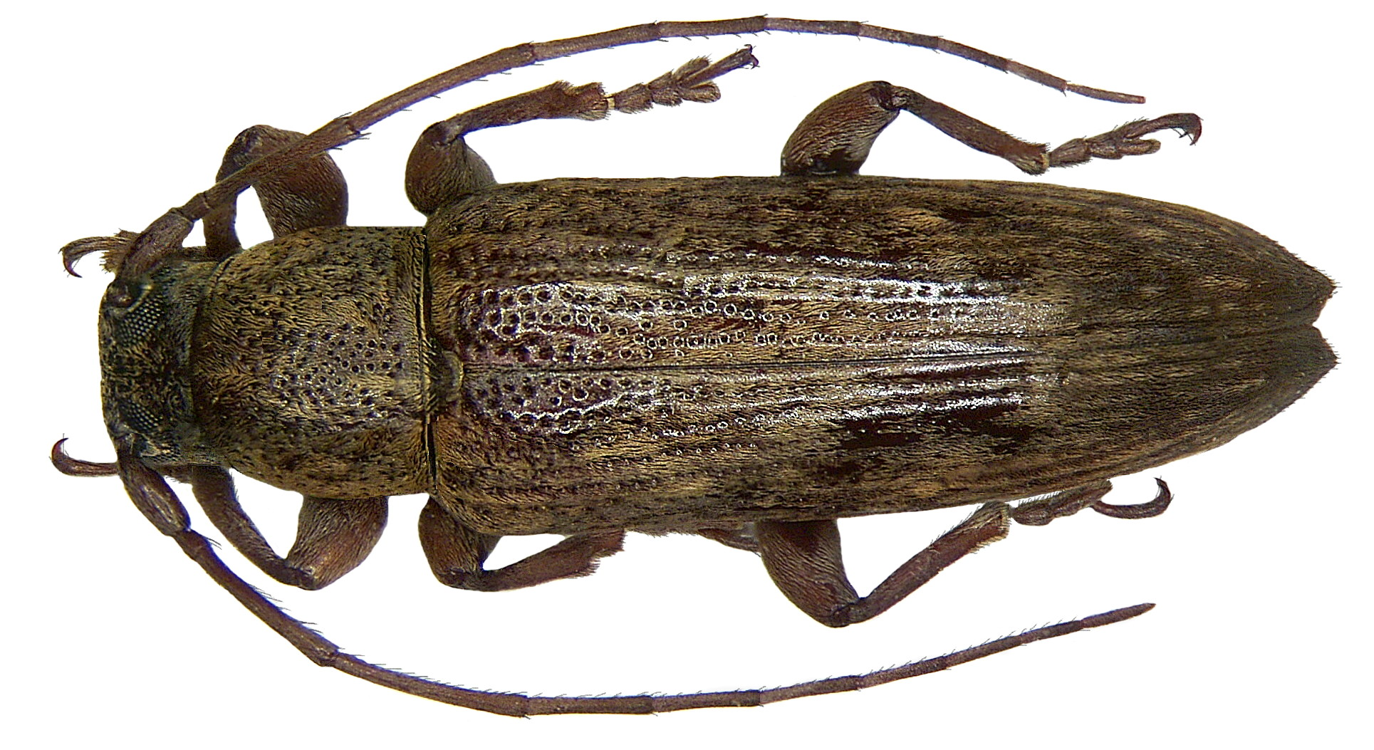 Familie: Cerambycidae Größe: 11,2 mm Fundort: Indonesien, Irian Jaya, Waigeo Type, Coll. Museum London Foto: U.Schmidt, 2008